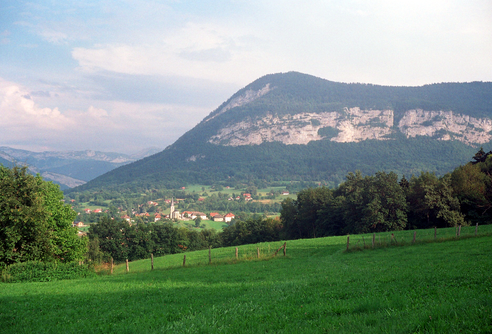 Cusy (Haute-Savoie) vu de Bellegois avec les Bauges en arrière-plan.